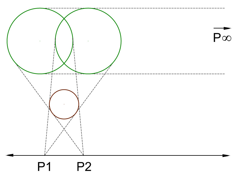 Teorema de Monge - 2º caso